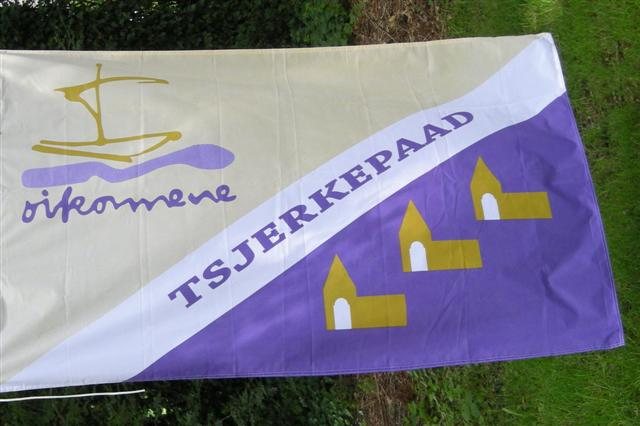 Vlag Tsjerkepaad (Flag churches in Friesland)